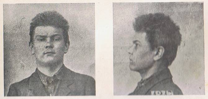 HenryK Baron w więzieniu, działacz OB PPS